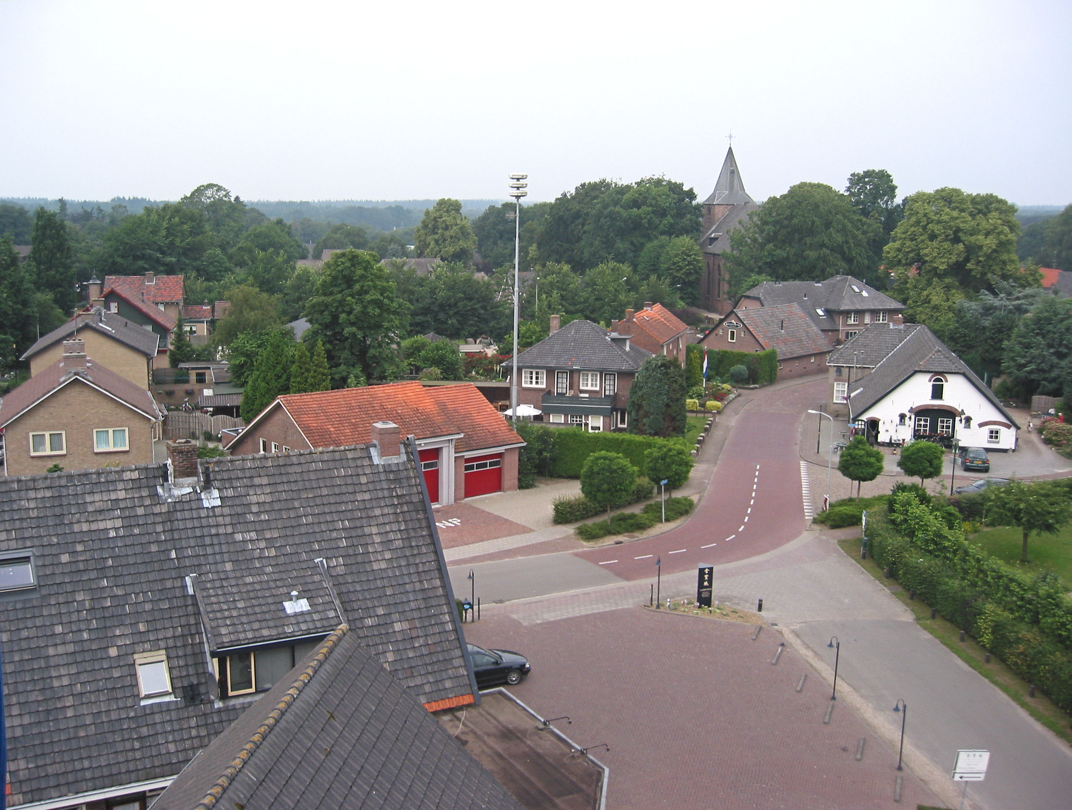 Zicht op een deel van Garderen gezien vanuit molen De Hoop